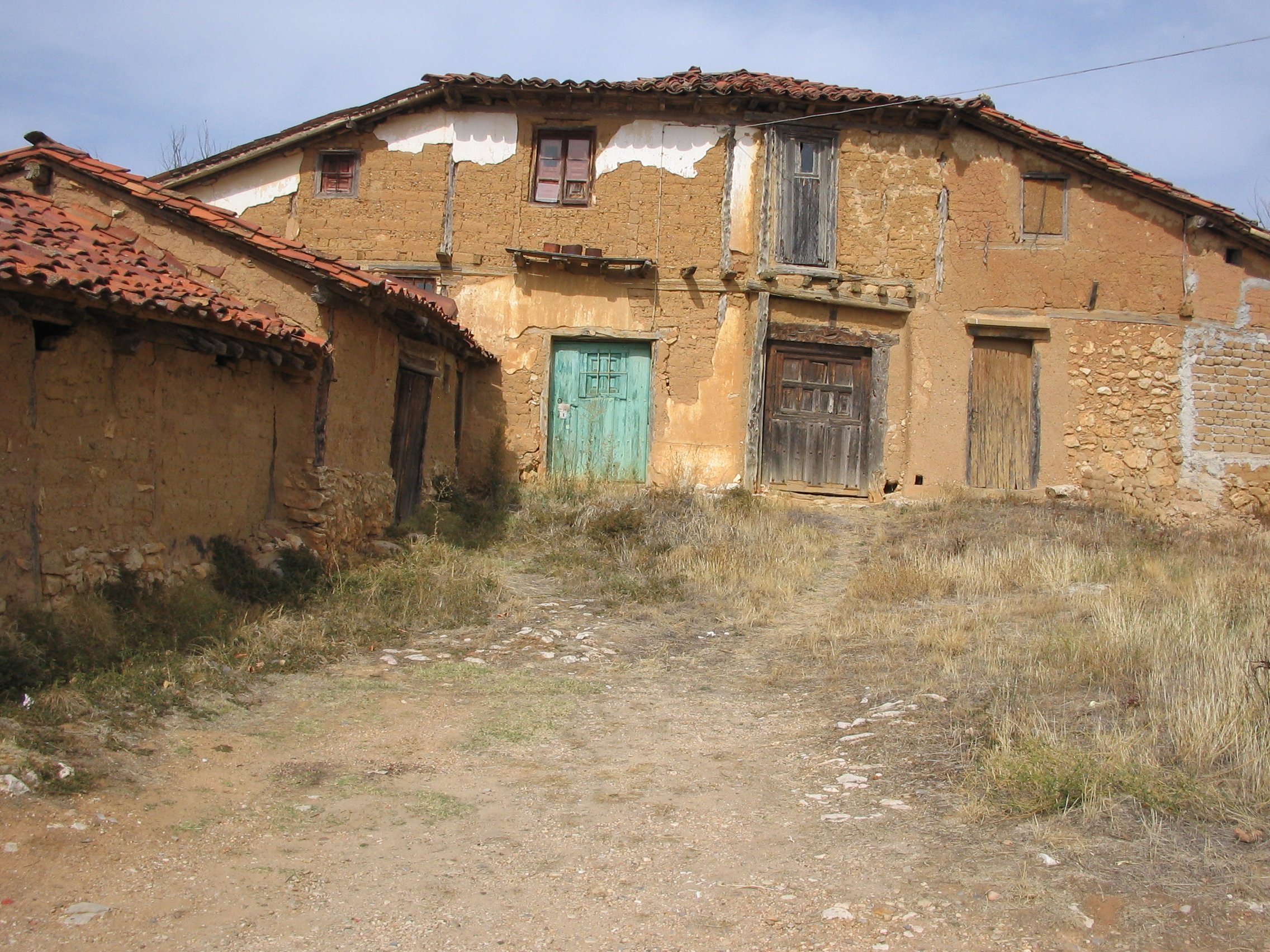 Casa en Santervás del Burgo (Soria)